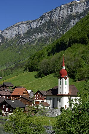 Isenthal (Nr. 03.1-4726)